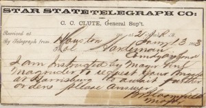 Telegrama da Start State Telegraph Co. Acervo do Museu da Imigração de Santa Bárbara d'Oeste, SP, Brasil